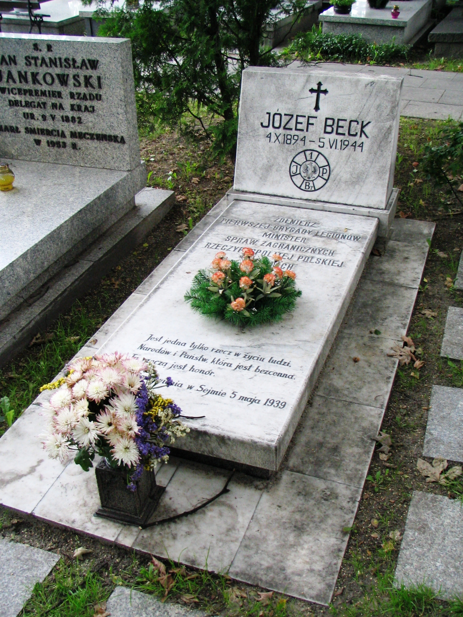 Grób Józefa Becka